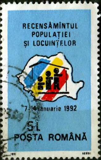 Recensamantul din 1992